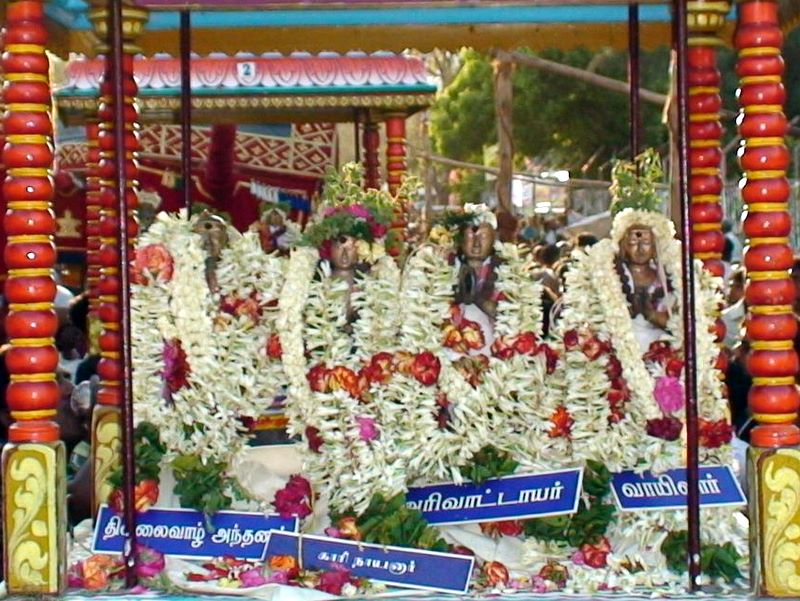 thillaivazh andhanar ("thogai adiyar"), Kaari nayanar, Arivattaya nayanar, Vaayilaar